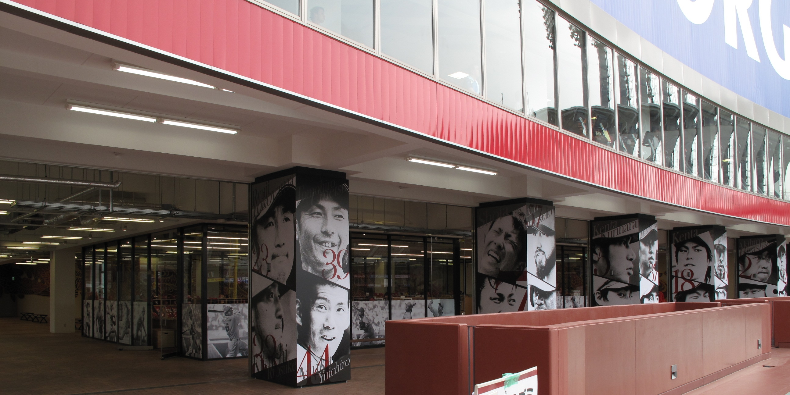 2013年3月に新しくオープンしたマツダスタジアム（広島市民球場）東側のカープ・グッズショップ